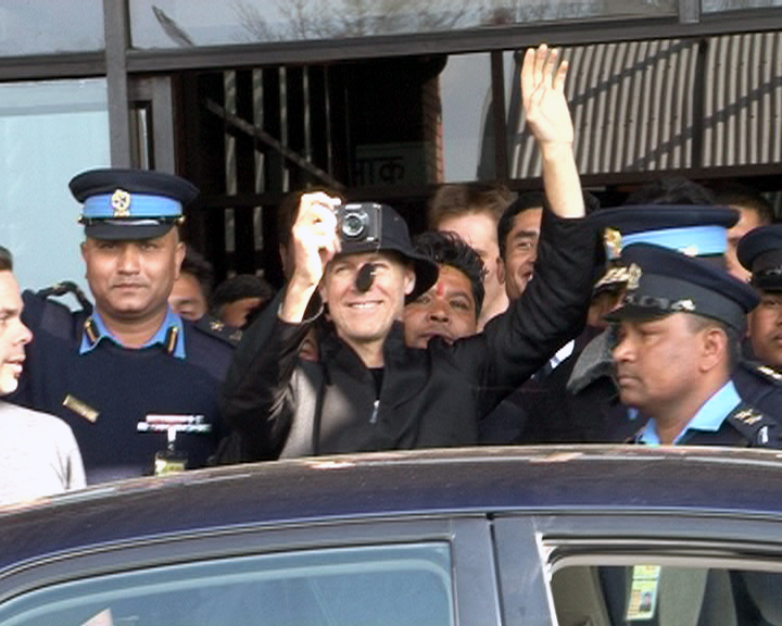 नेपाली: नेपालमा ब्रायन